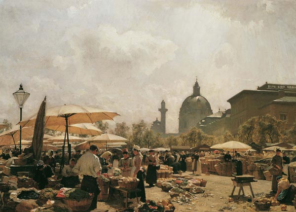 Der Naschmarkt in Wien, 1894; Ölgemälde. Belvedere